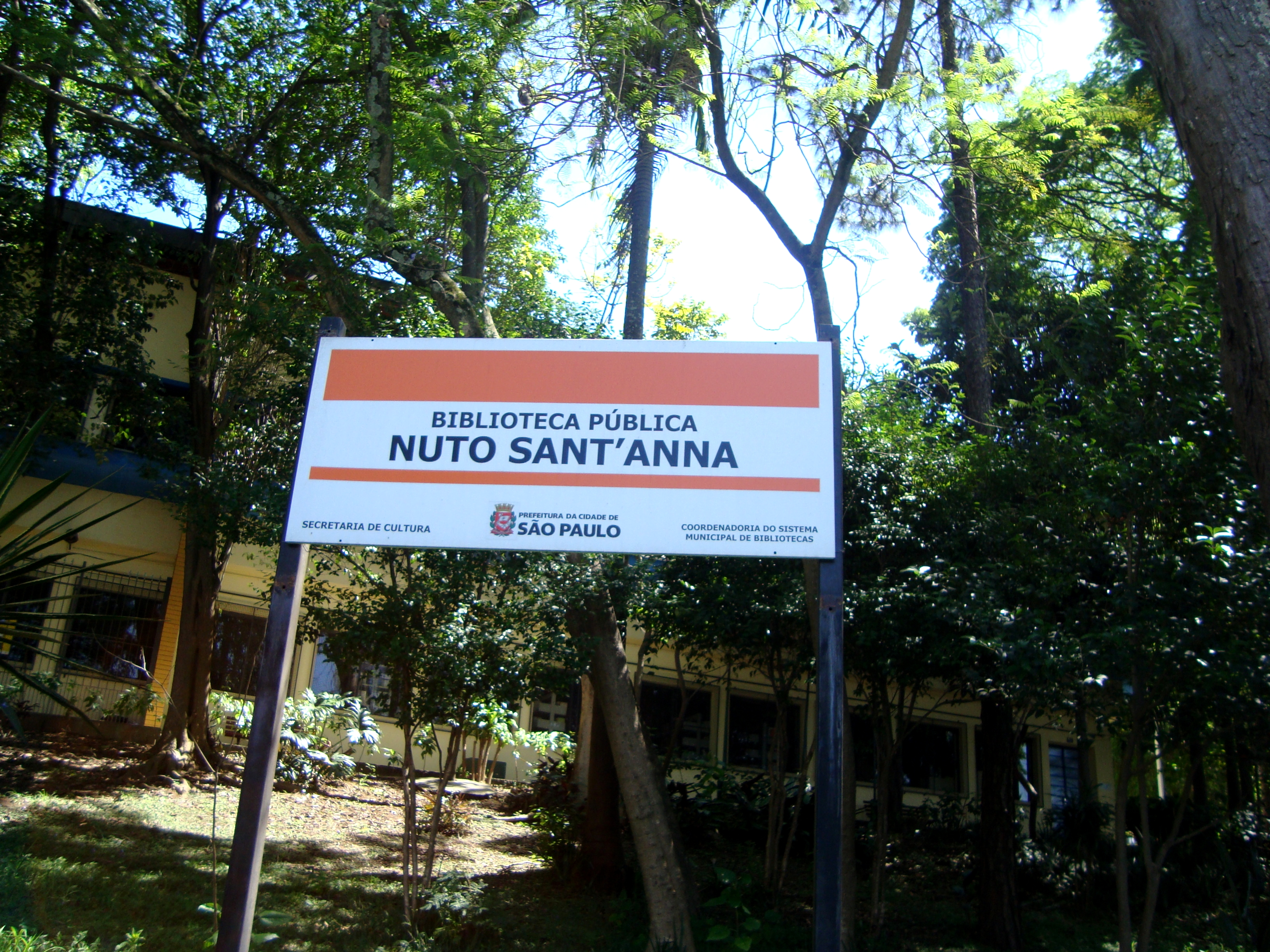 Foto da Biblioteca Nuto Sant' Anna no bairro de Santana, zona norte da cidade de São Paulo -BR